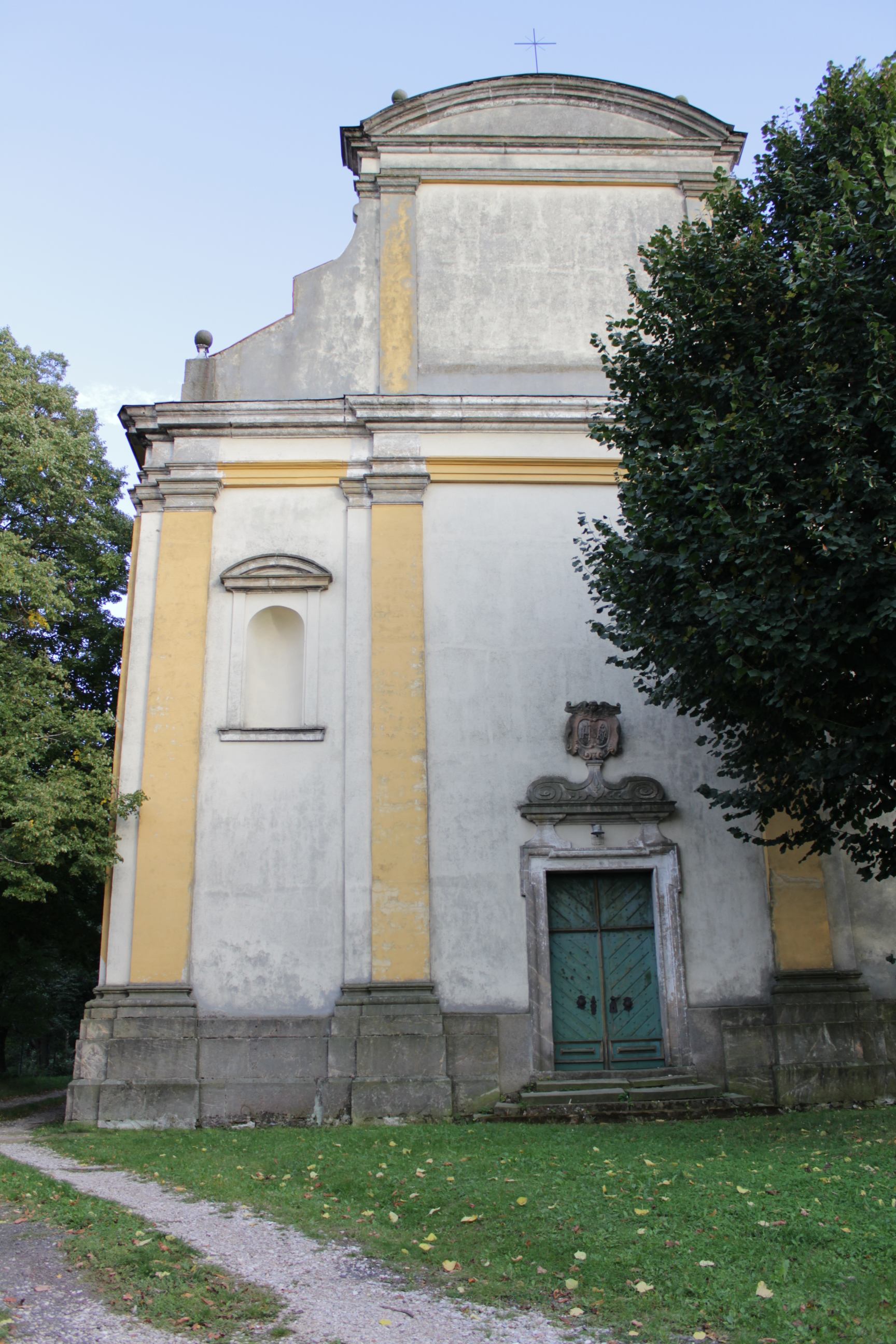 Kostel Narození P. Marie (Popovice), uprostřed vsi na návrší, Popovice